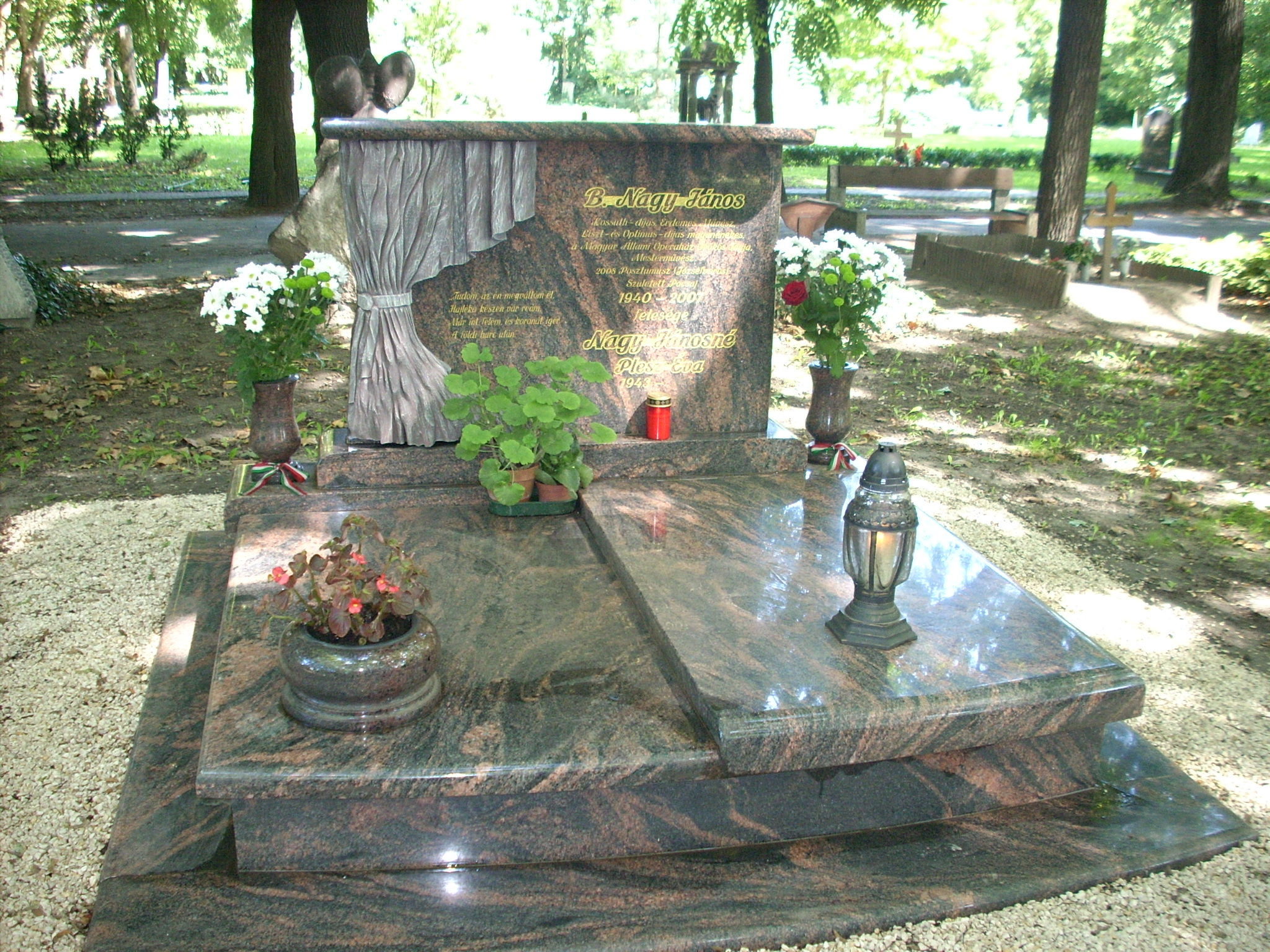 B. Nagy János operaénekes végleges sírja a Kerepesi temetőben (Budapest)